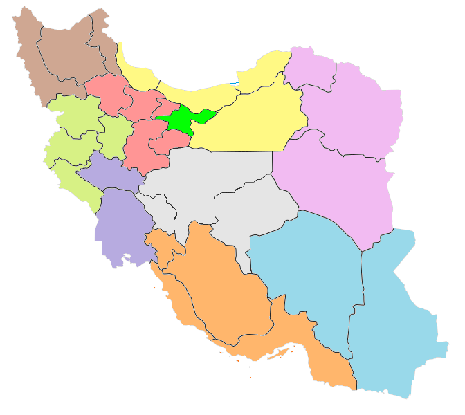 نقشه قطب های ده گانه دانشگاه های علوم پزشکی کشور